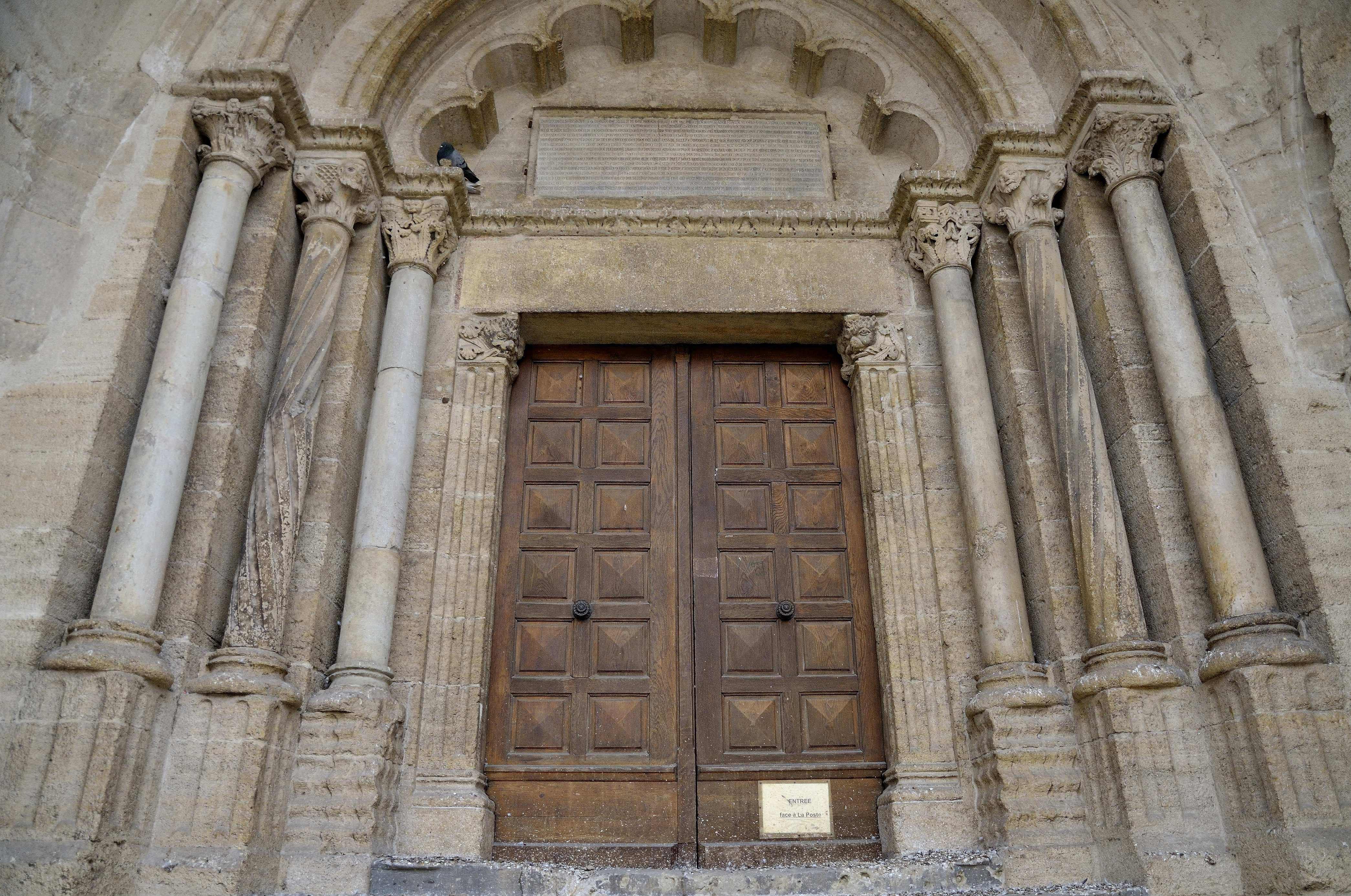 église notre dame d'Etoile